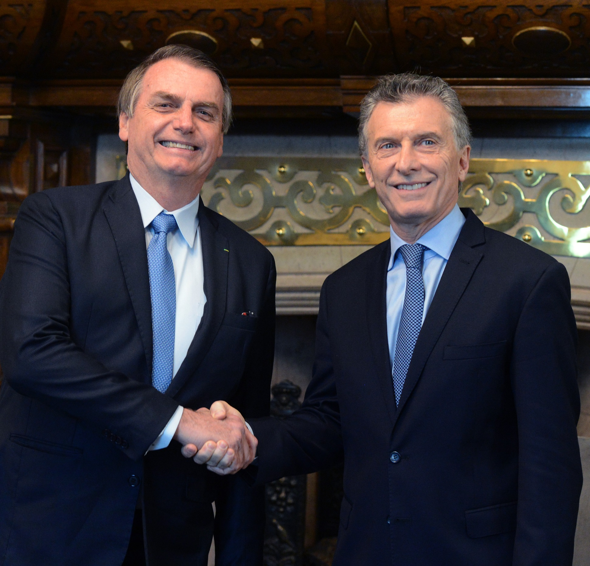 Los presidentes Mauricio Macri y Jair Bolsonaro consolidaron los vínculos entre la Argentina y Brasil y ratificaron el compromiso de combatir el crimen organizado, las mafias y la corrupción, defender las políticas de derechos humanos y la democracia en la región y de elevar los niveles de integración bilateral en materia energética para potenciar las oportunidades de desarrollo de ambos países, entre otros puntos en común.